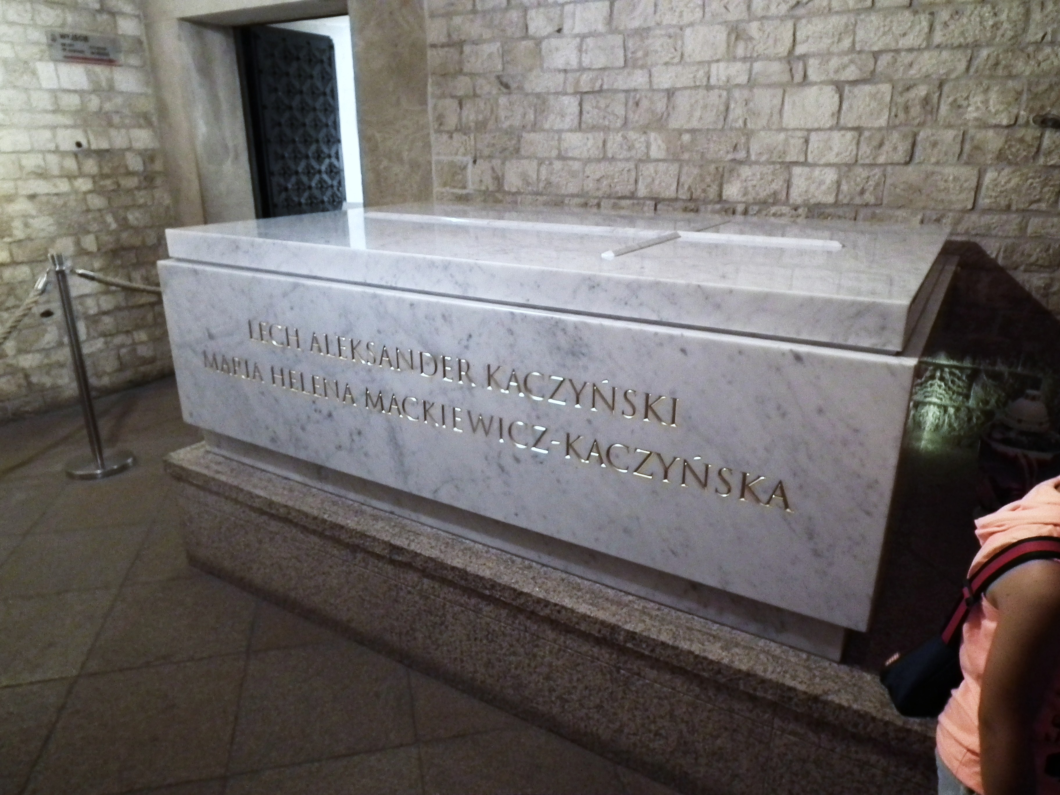 Grobowiec Pary Prezydenckiej. Fotografia z dnia, kiedy Tusk zeznawał w sprawie zaniedbań smoleńskich.